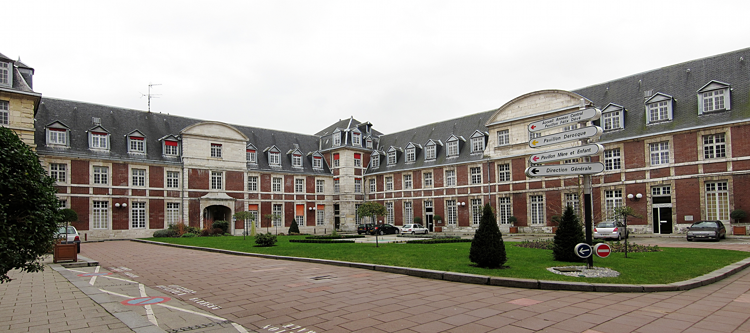 La cour d'honneur de l'Hospice Général de Rouen.